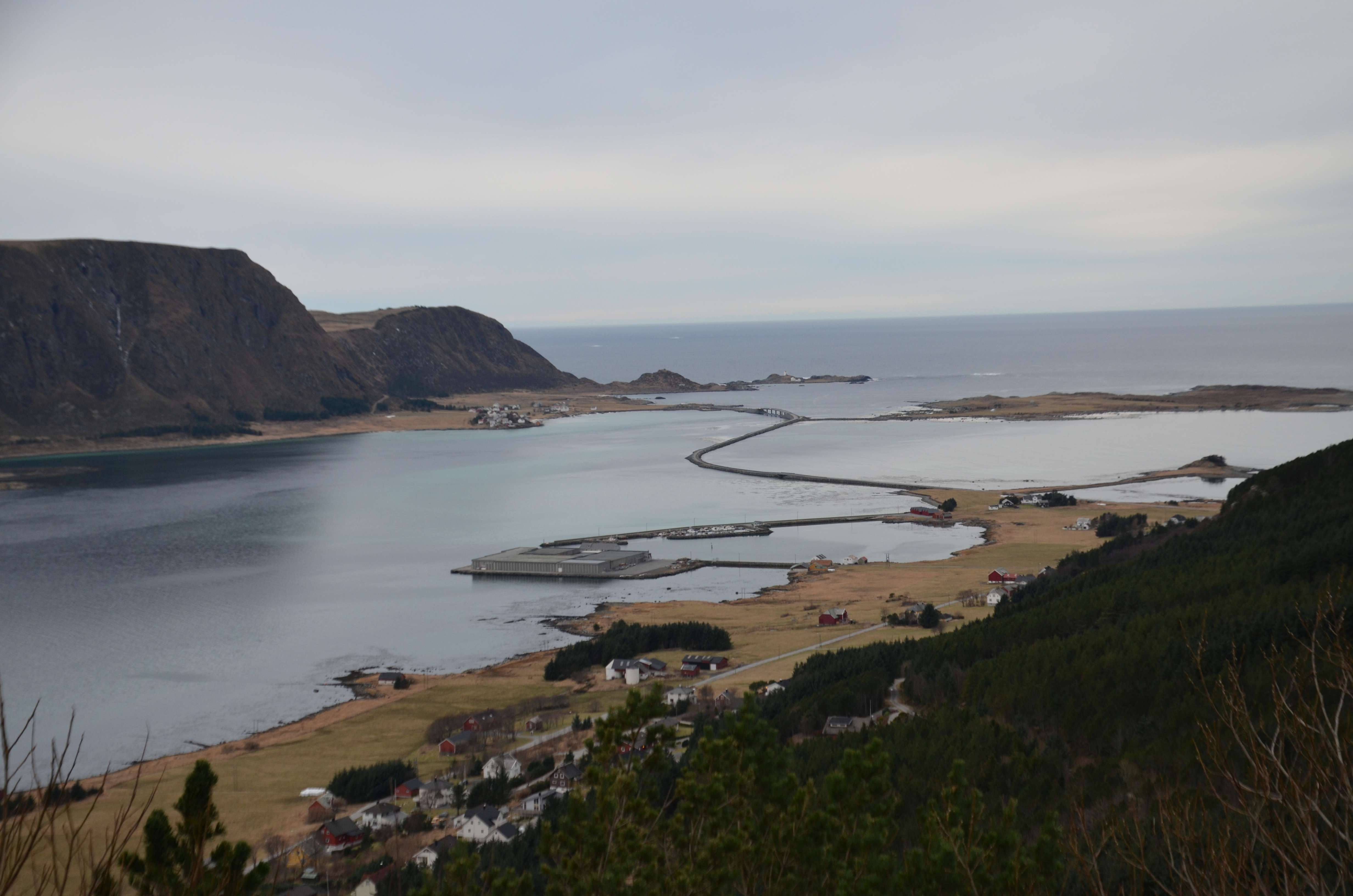 Longva